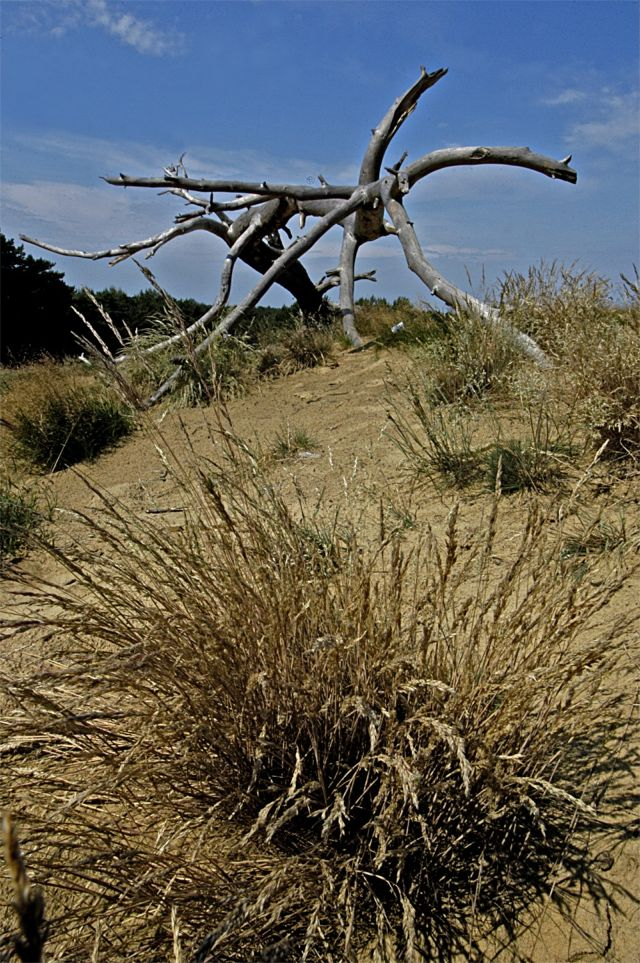 Aussicht der Storkower Binnendüne in den Waltersbergen